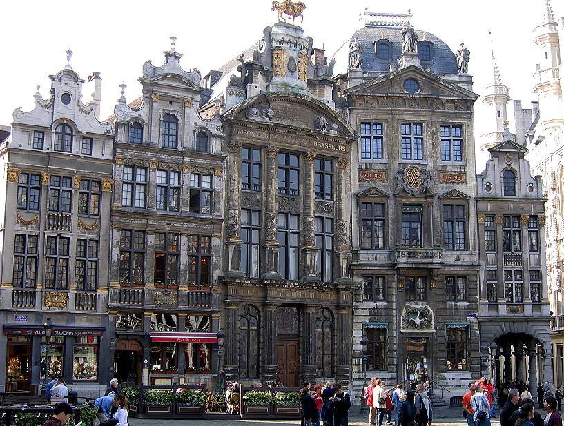 Häuser am großen Markt in Brüssel.